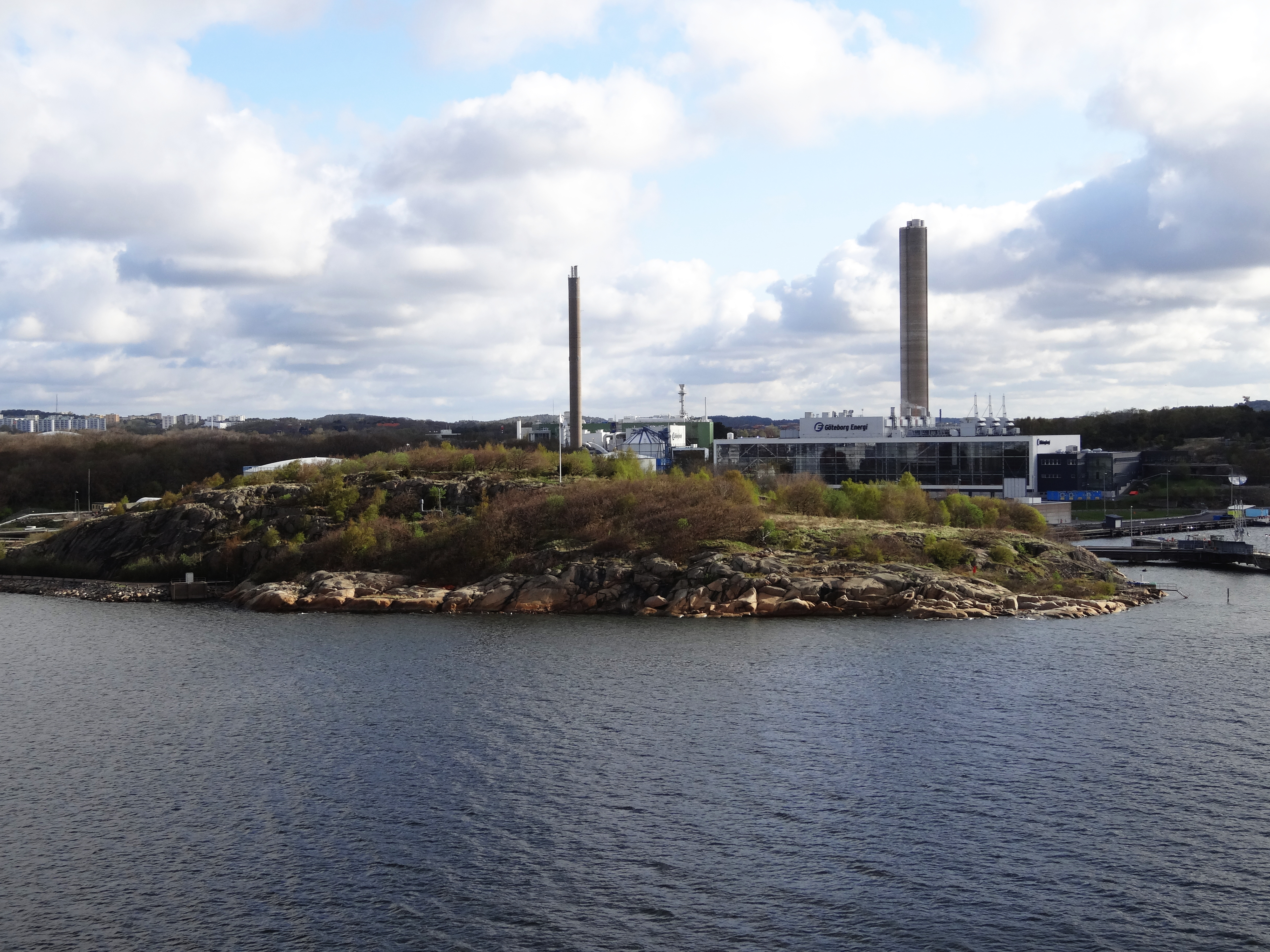 Rya Nabbe, en udde på Hisingen i Göteborg.